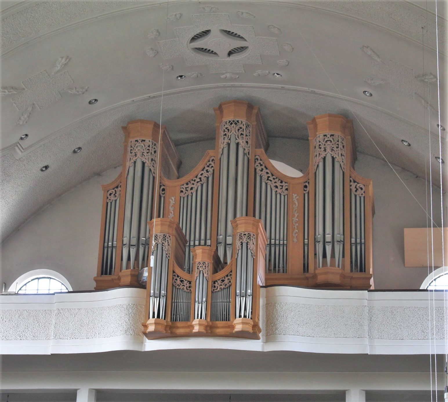 Orgel von St. Canisius in München-Großhadern (1983, J. Garhammer, III/38)